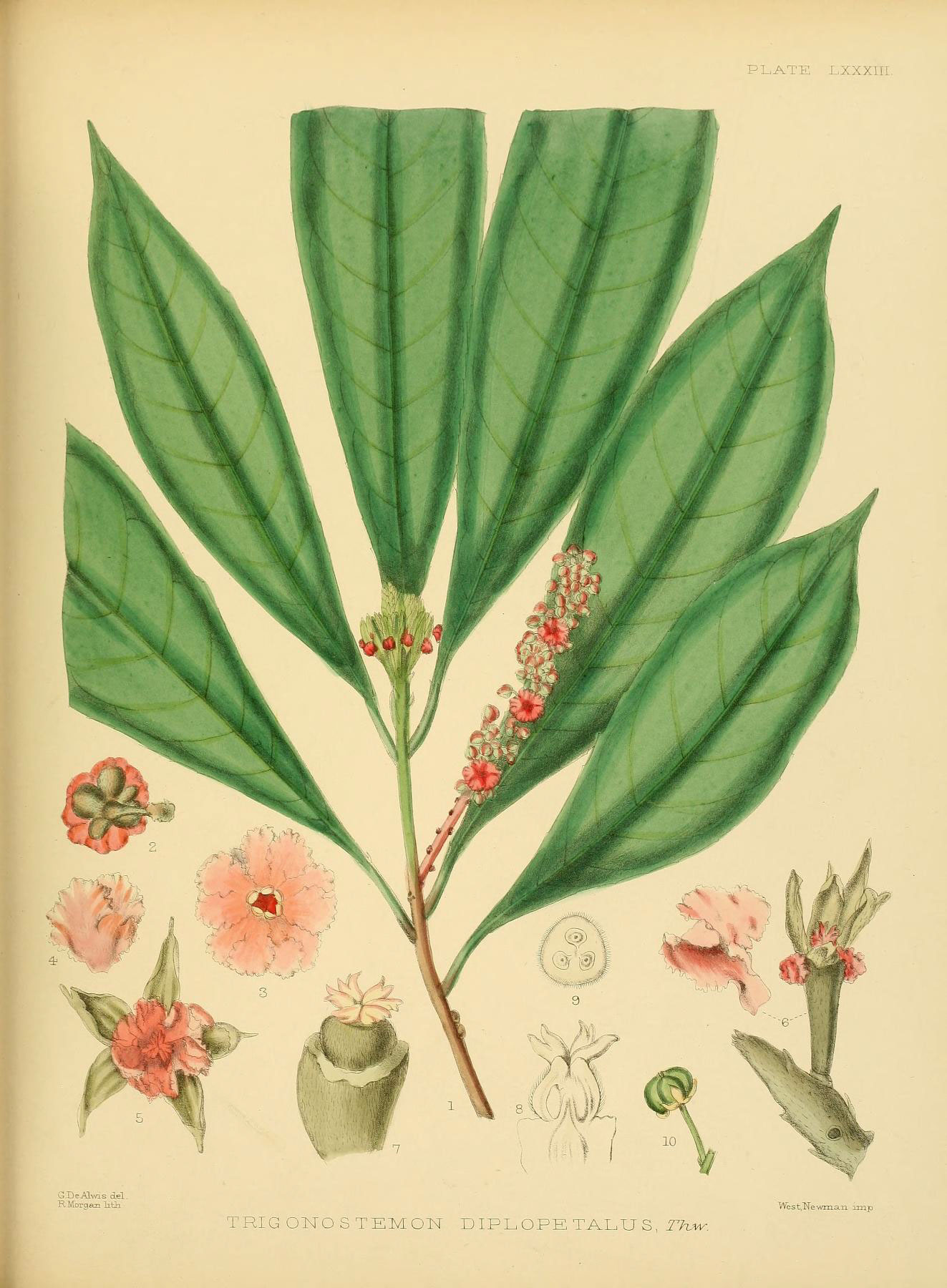 . G UeAHvis del. R Morgana lifcli TRIGONOSTEMON D IPL OPE TALU S, TKw. VVest,"N"ewma."n. imp